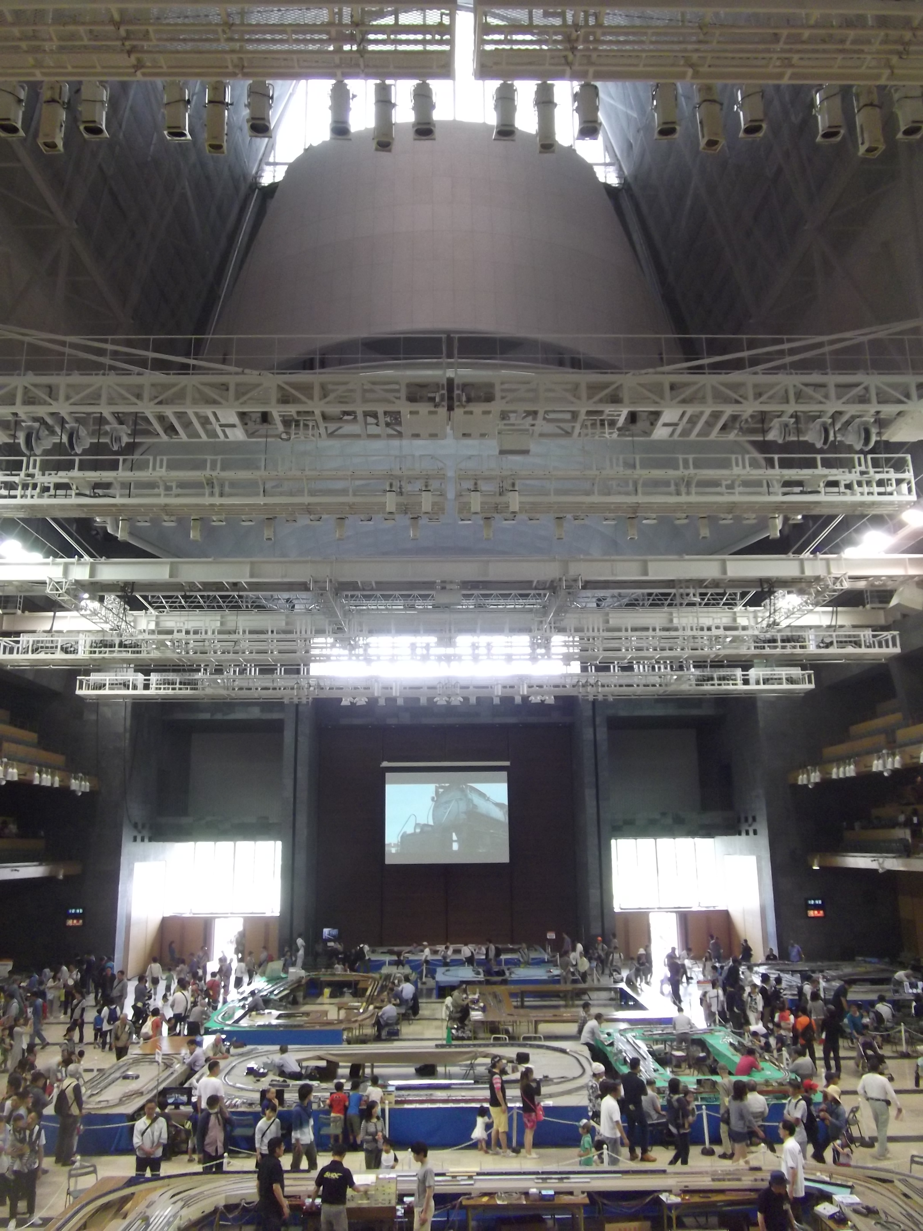 グランシップトレインフェスタ2016、大ホール・海の様子。